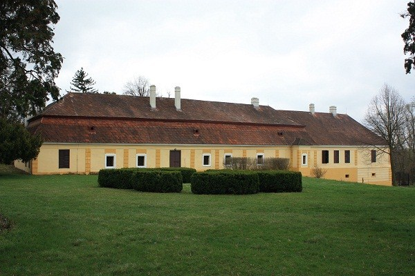 Kaštieľ